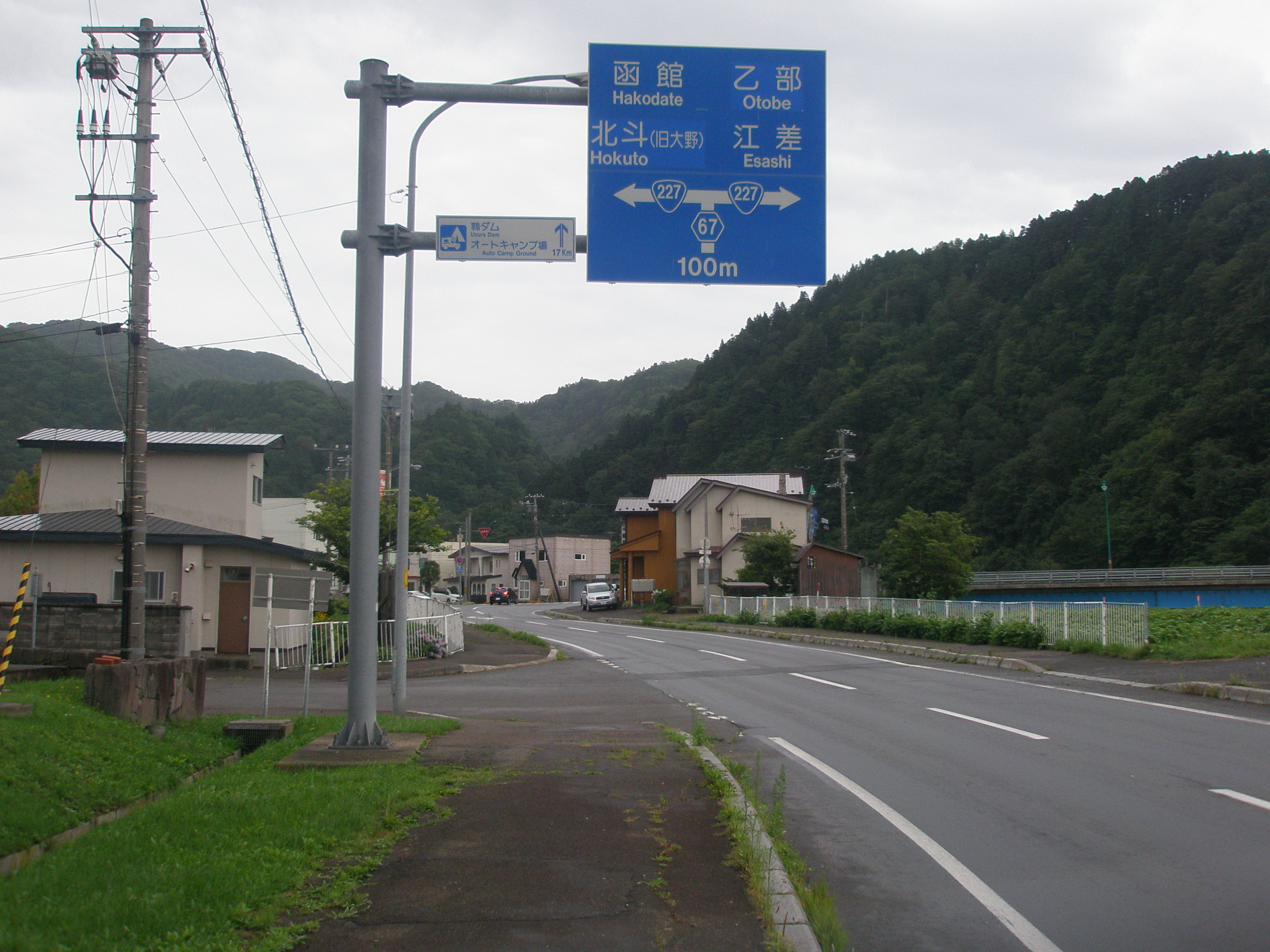 北海道道67号八雲厚沢部線・終点-1（起点側から、2018年8月撮影）